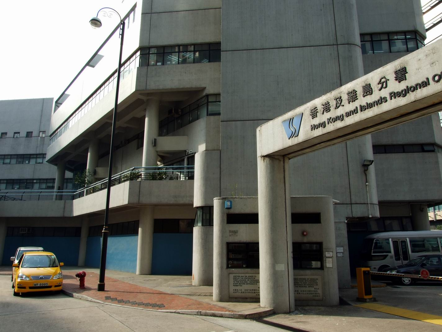 水務署香港及離島分署